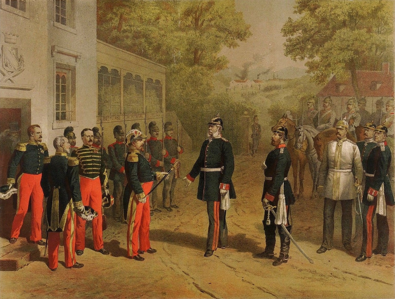 Wilhelm I., Napoleon III. & Bismarck. - Gefangennahme. - "Napoleon vor König Wilhelm bei Sedan am 2. September 1870